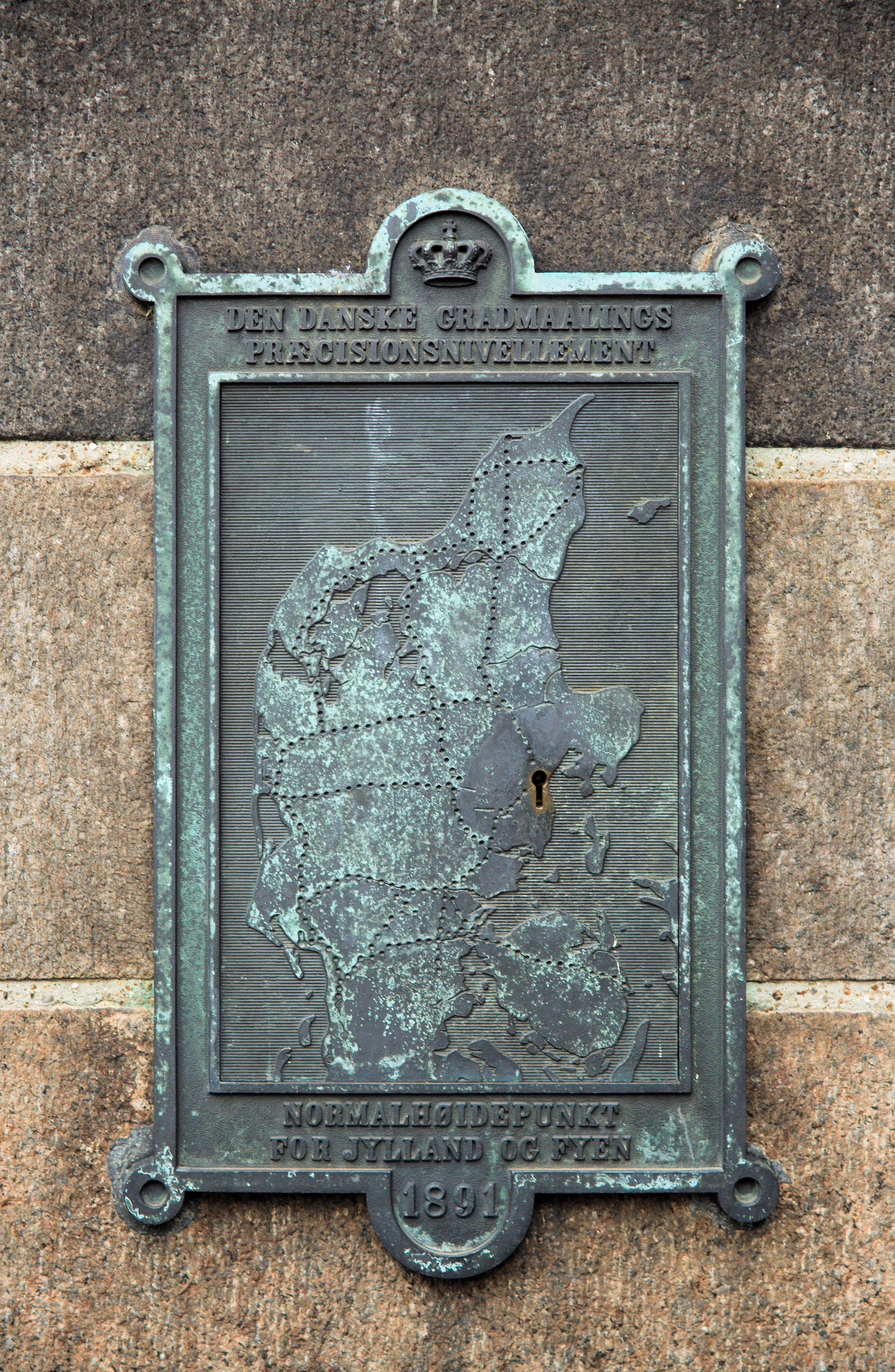 Den Danske GradMåling Præcisionsnivellement i den østlige end af Århus Domkirke